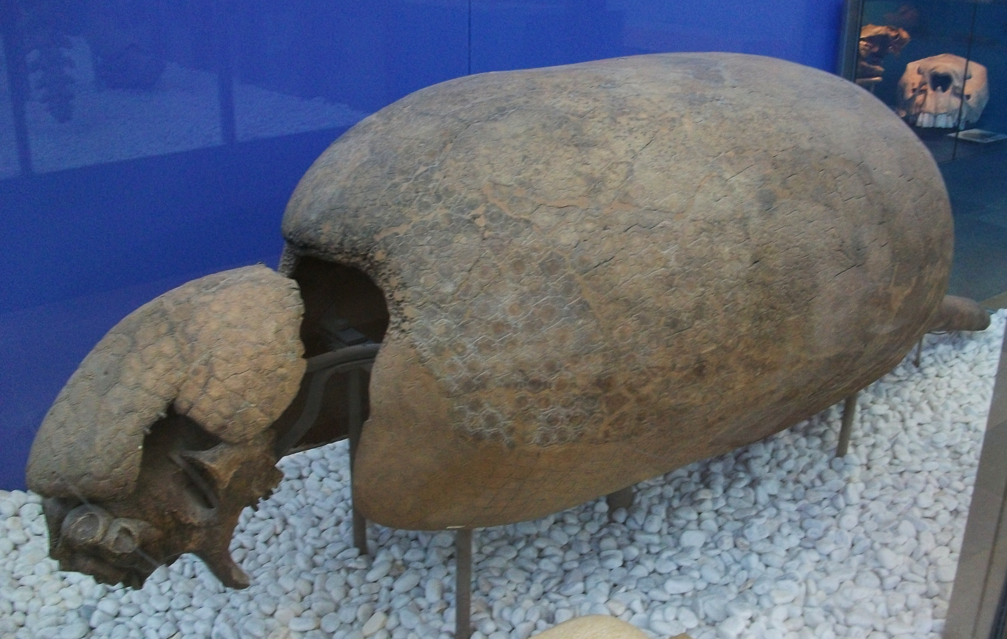 Sclerocalyptus ornatus, gliptodòntid, Museu de Ciències Naturals de València.